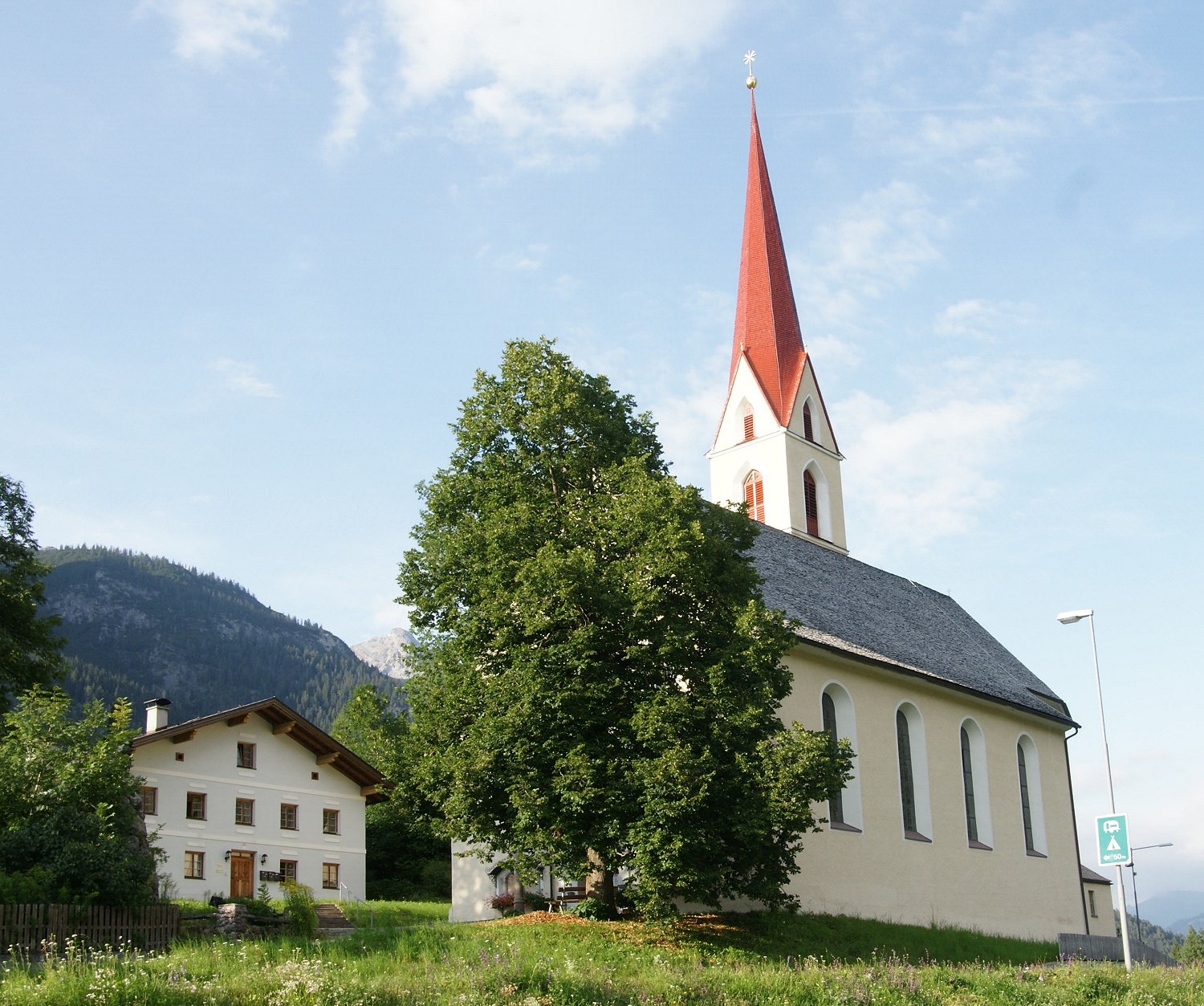 Kath. Pfarrkirche hl. Martin, Friedhof m. Aufbahrungshalle